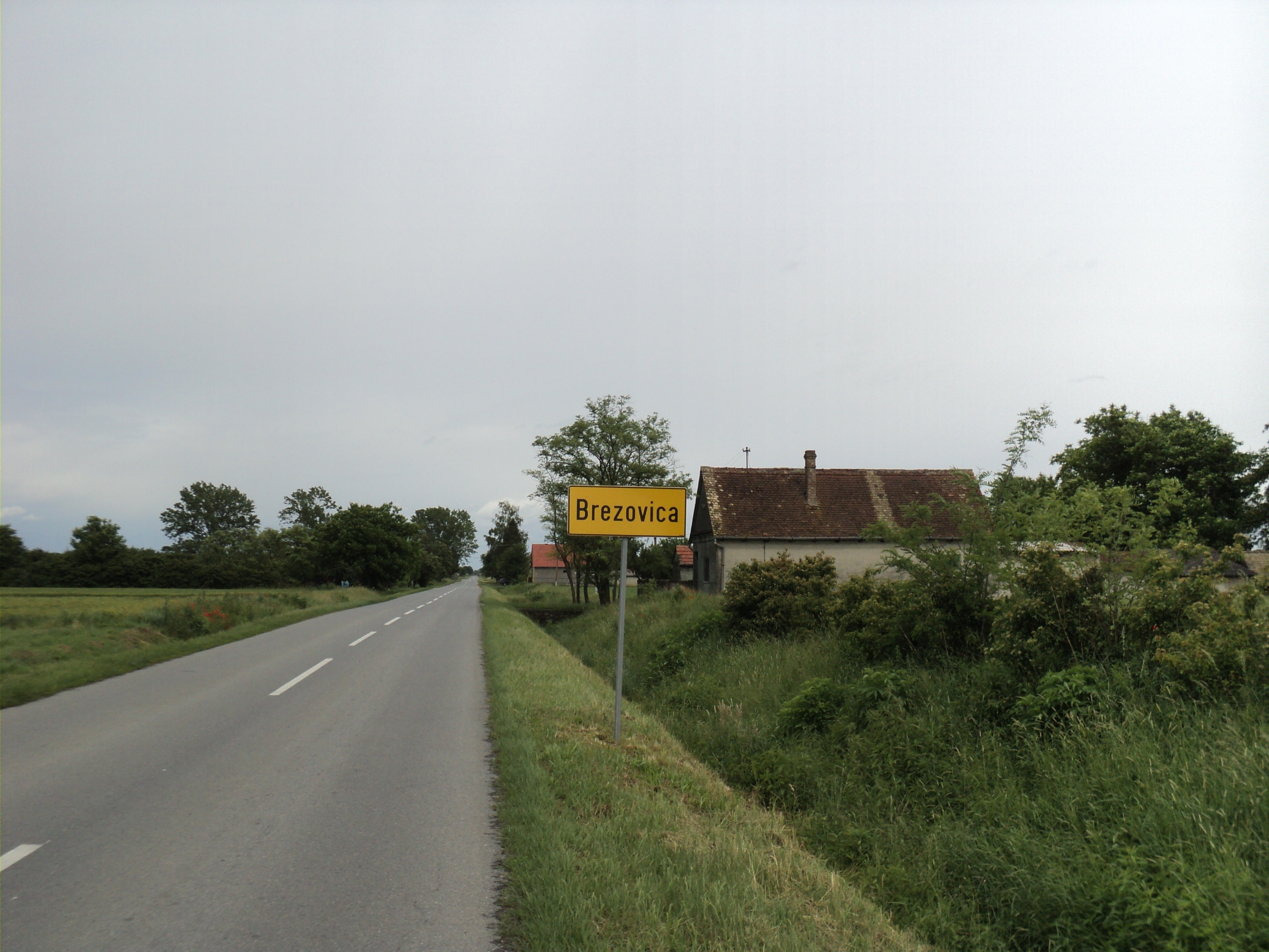 Ulaz u Brezovicu.